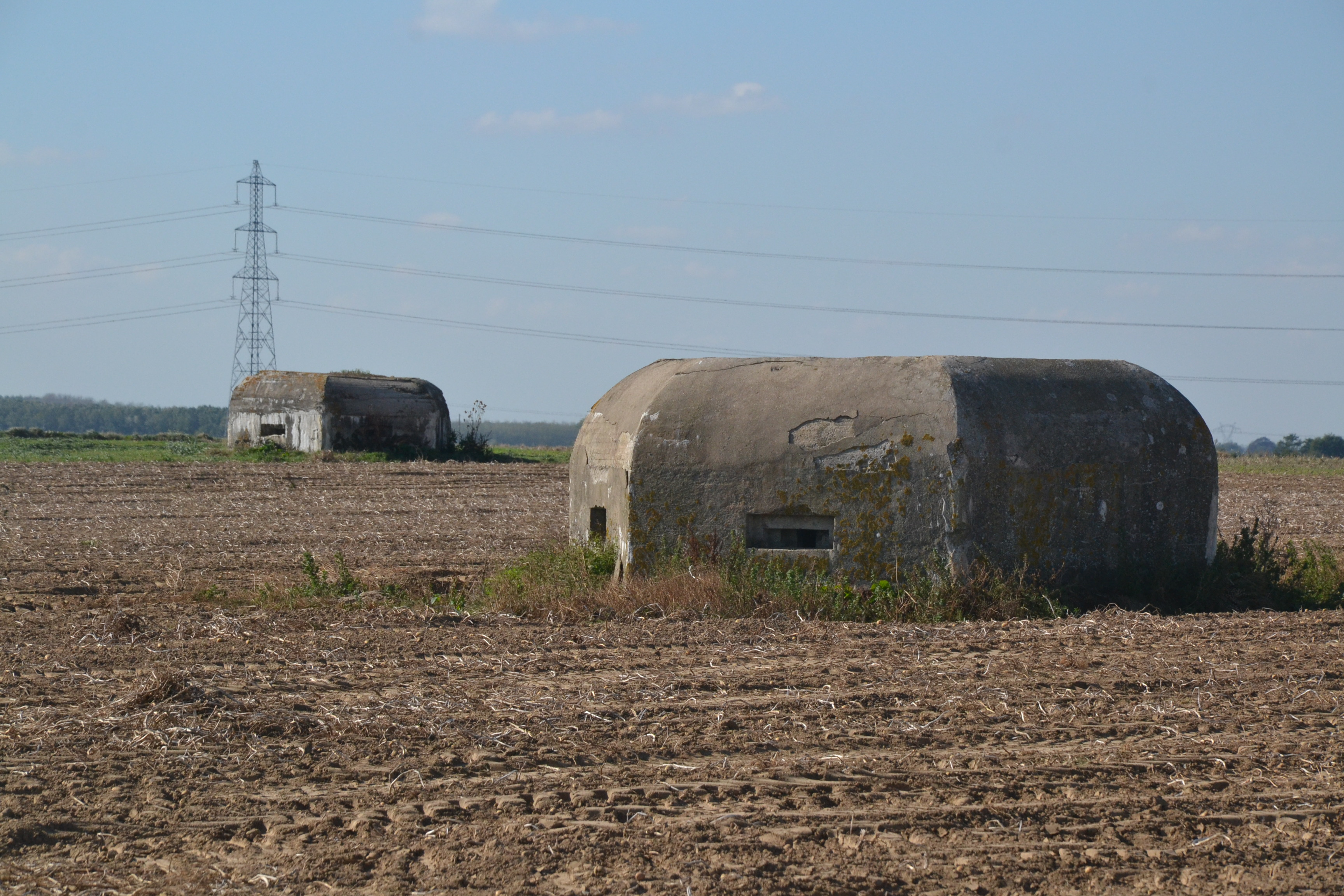 Casemate de la ligne Maginot près de Cysoing (Nord, France).